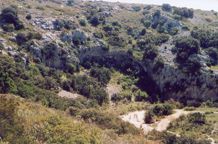 Description: Garrigue, France, Hérault Chêne vert, chêne kermes, et cistes, sur calcaire. Source: Hugo Soria Licence: GFDL Hugo Soria